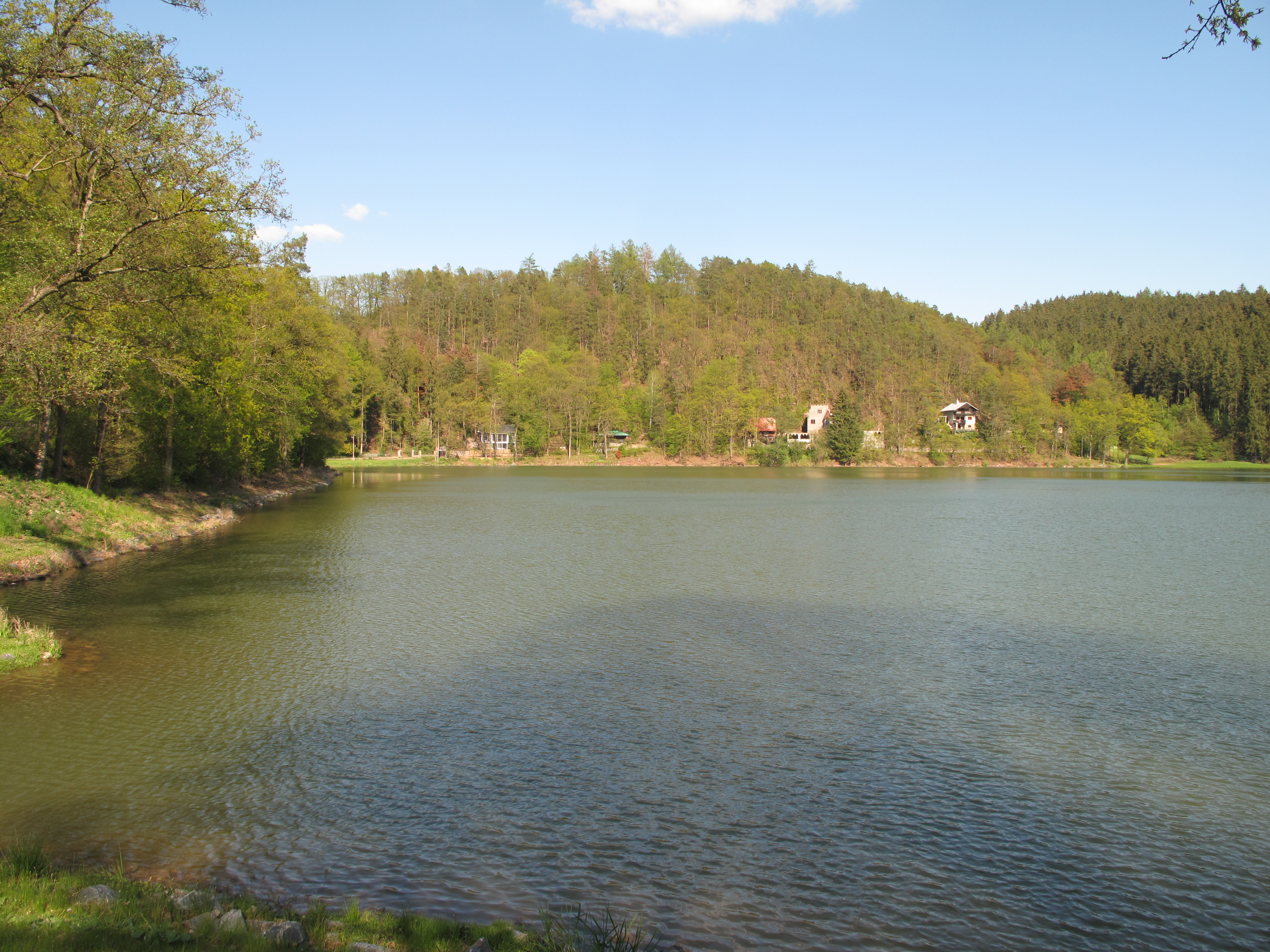 Rybník Propast u vsi Hradec. Okres Praha-východ, Česká republika.